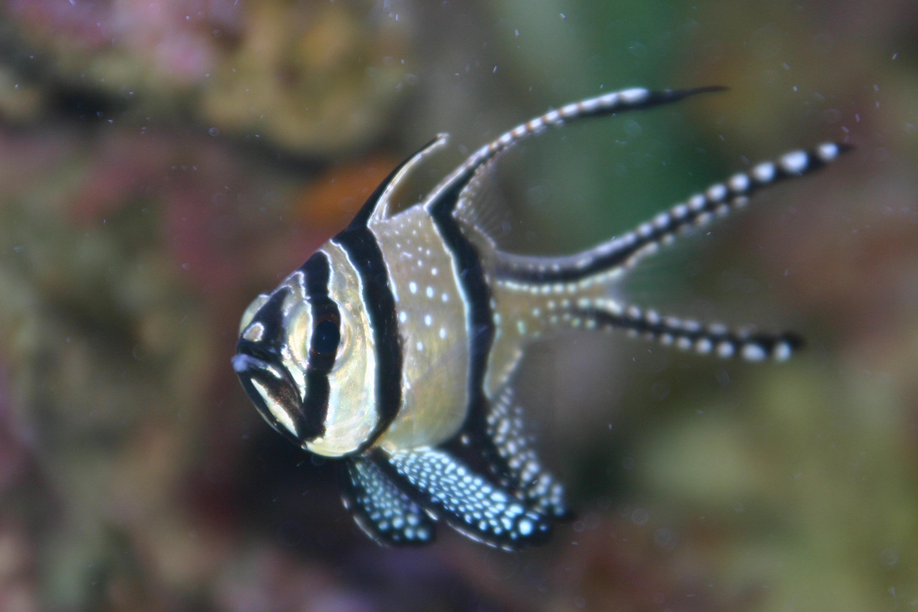 Cardenal de Banggai en acuario de arrecife